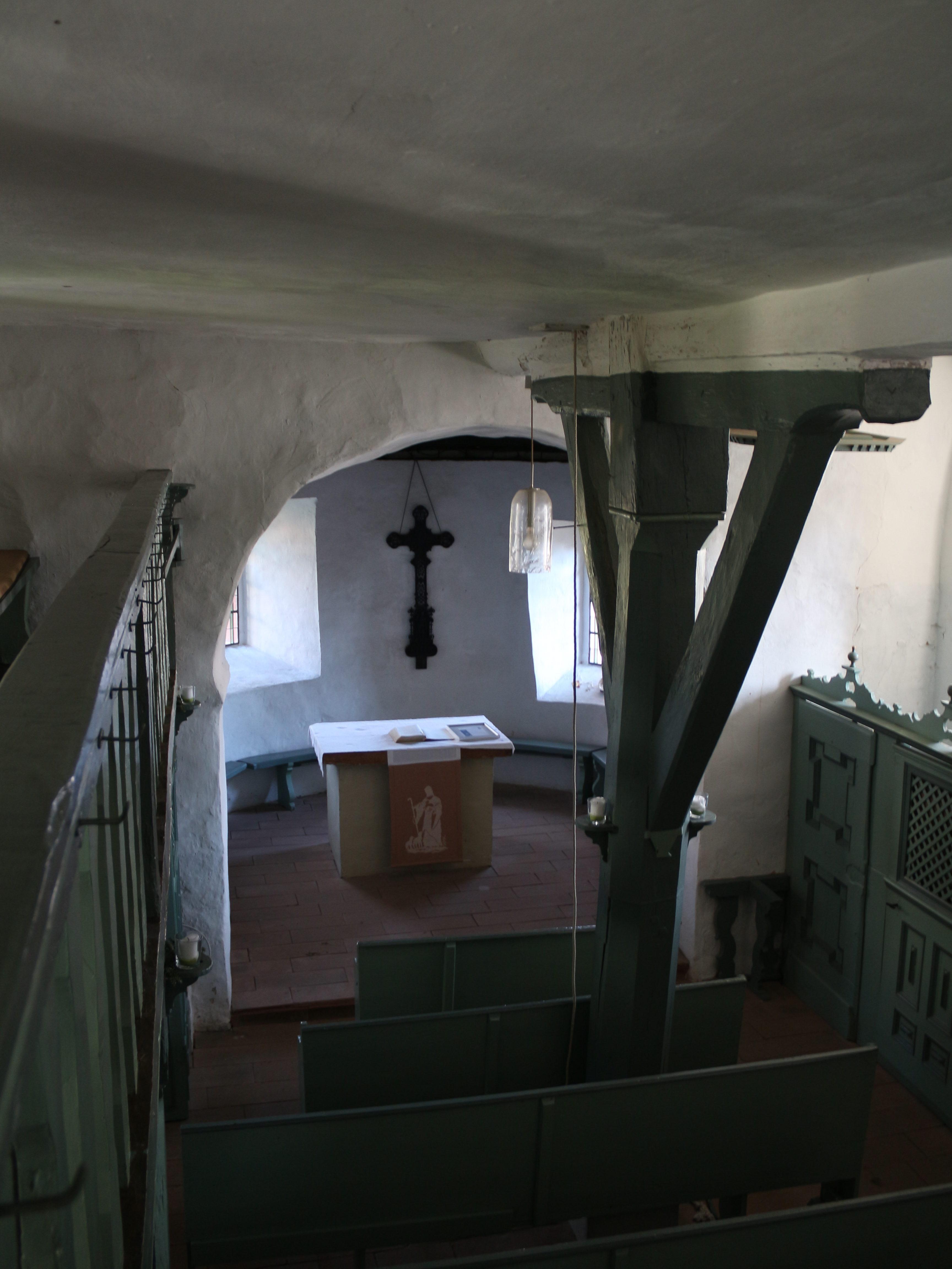 Hufeisenkirche Altenvers